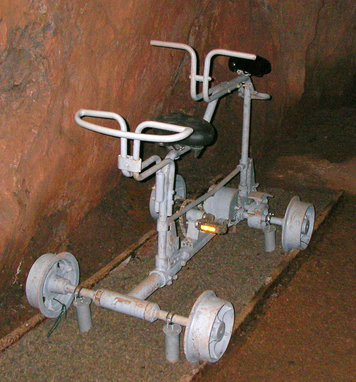 Gruben-Tandem-Draisine in Adorf (Diemelsee), Grube Christiane (Germany)